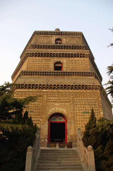 中国河南省开封市繁塔（天清寺塔） Po Pagoda, in Kaifeng, was originally called Xingci Temple Pagoda.